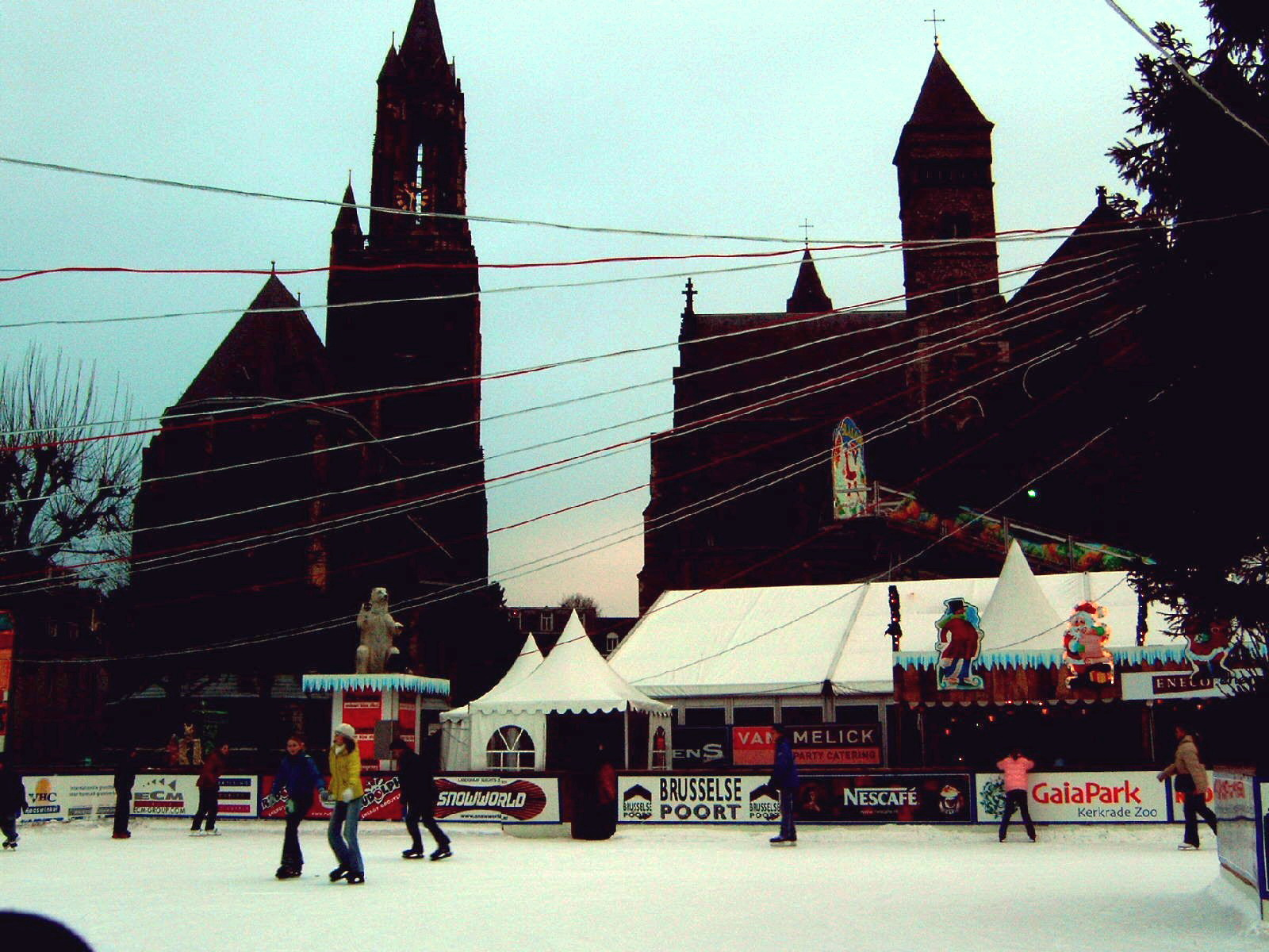 Tijdelijke kunstijsbaan op het Vrijthof in Maastricht, december 2005. Eigen opname.